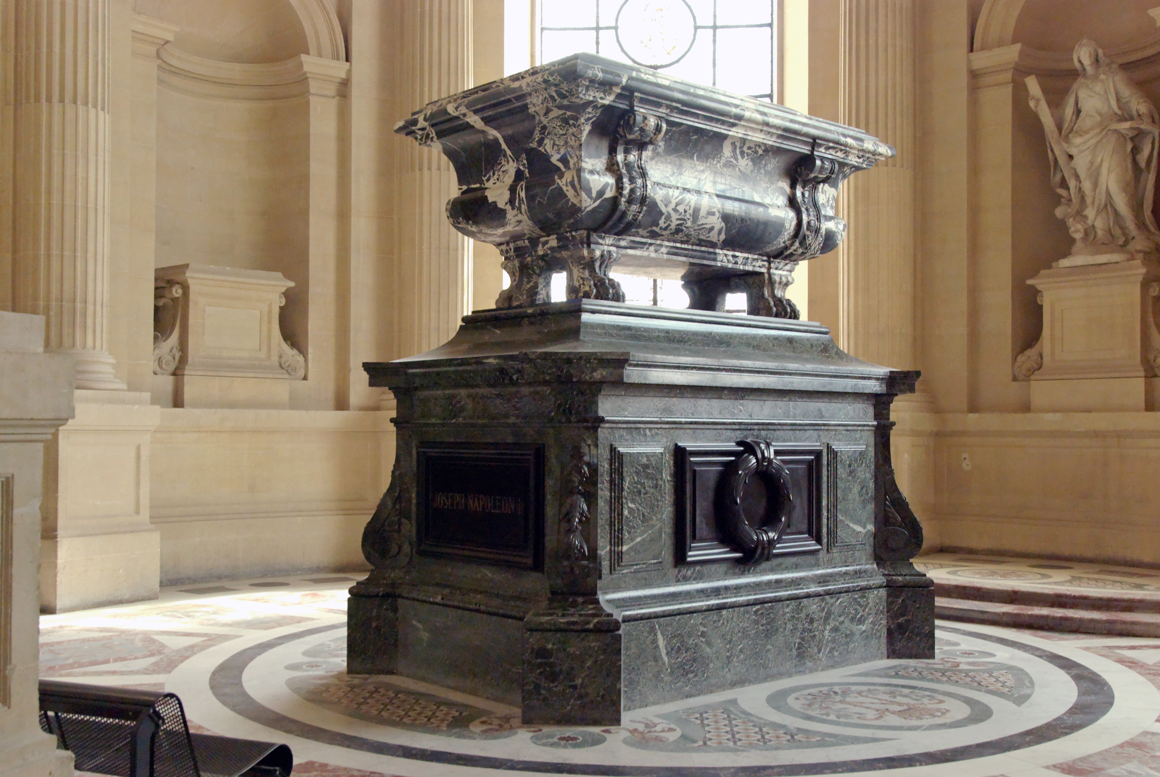 Alphonse-Nicolas Crépinet (Français, 1826-1892): Tombeau de Joseph Bonaparte, frère ainé de Napoléon Ier, chapelle Saint-Augustin du Dôme des Invalides, VIIe arrondissement, Paris, France.